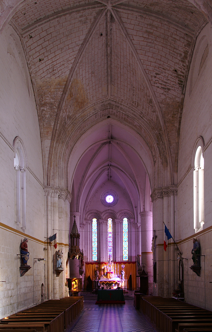 Beschreibung: Pfarrkirche Saint-Pierre-de-Pérignac, Schiff gen Osten b Quelle: Fotographie selbst angefertigt Datum: 01.10.2005 Autor: S.Hümmer